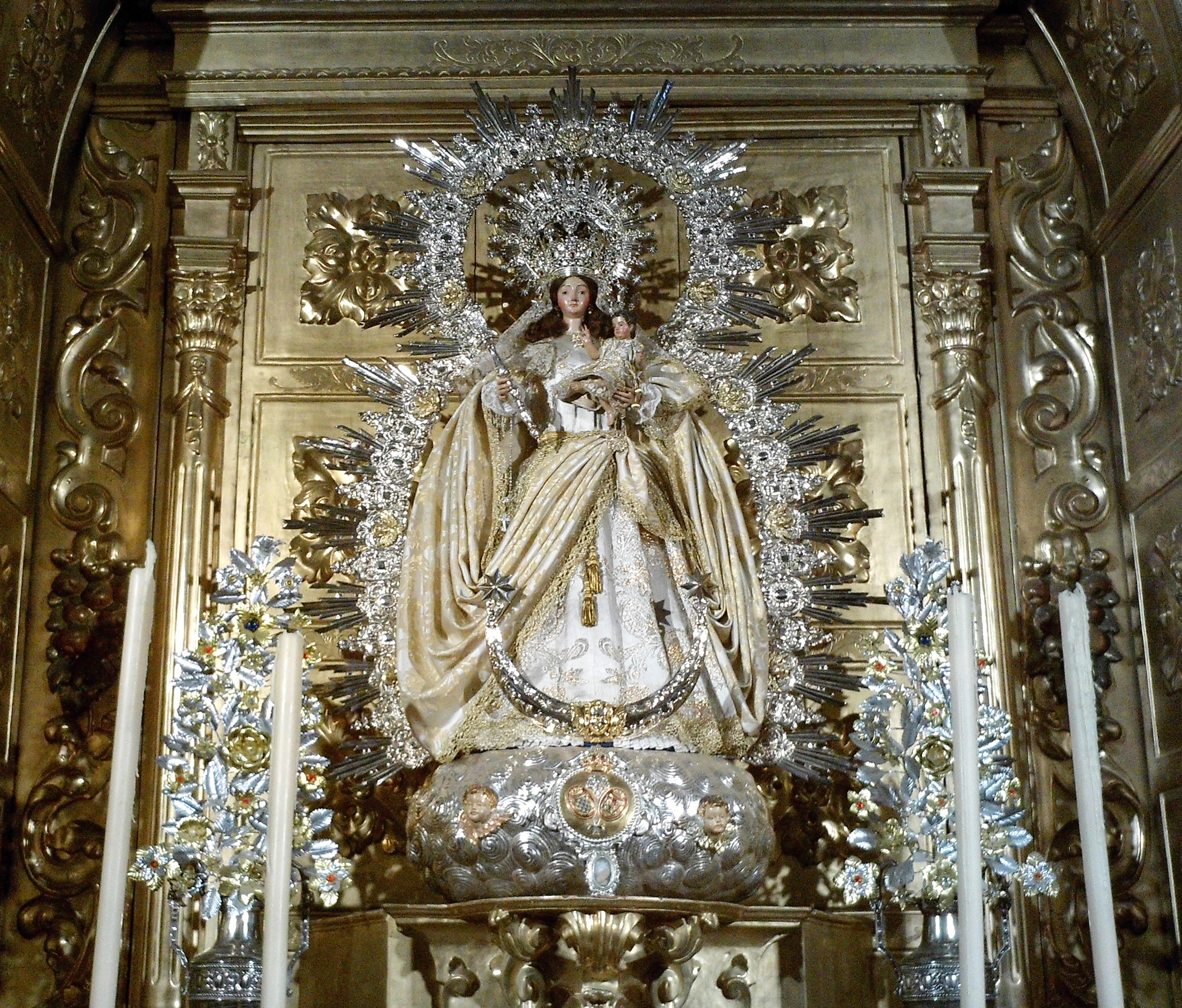 Virgen de Montemayor. Iglesia de San Juan de la Palma. Sevilla, Andalucía, España.